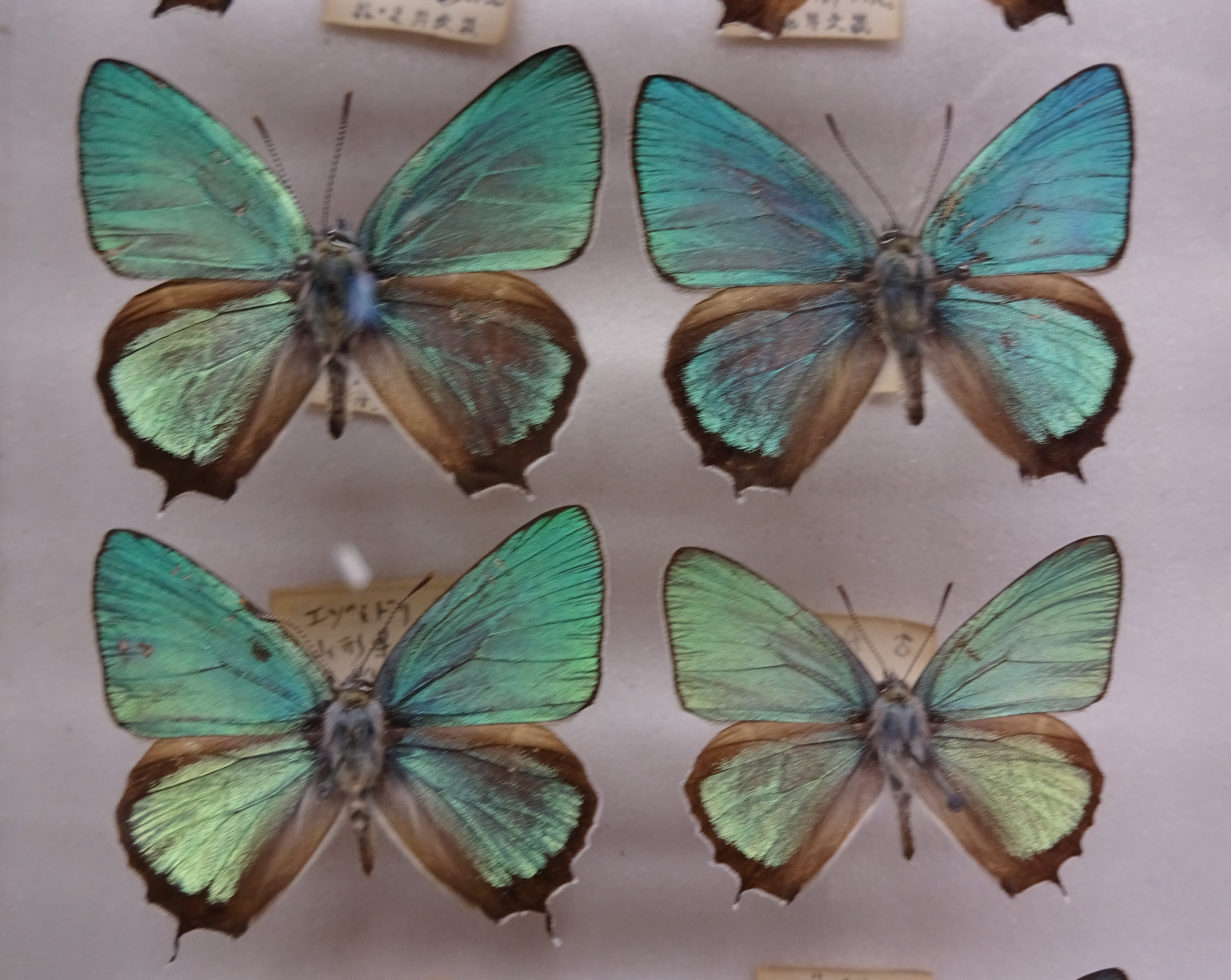 エゾミドリシジミ